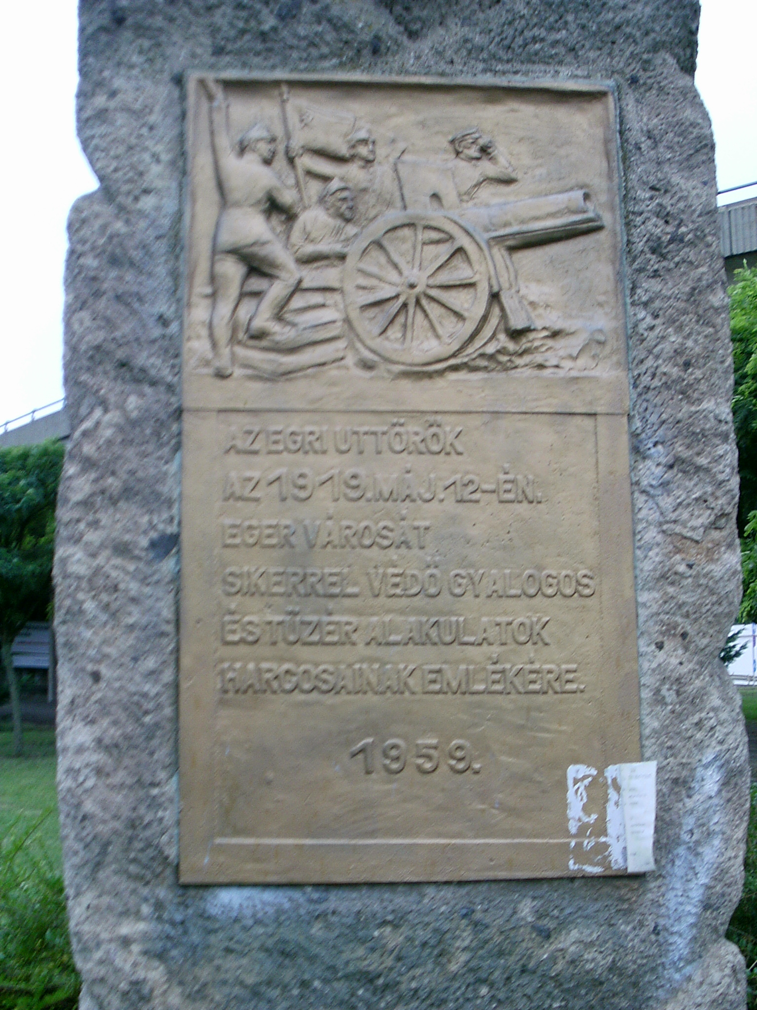 Az Egri Tanácsköztársasági csata emkléműve. Az 1919-es emlékmű az 1919 május 12-én Egert sikerrel védő vöröskatonák (gyalogos és tüzér) alakulatoknak emlékét őrzi. Forrás: Csiffáry Gergely: Történelmi emlékhelyek Heves megyében,1985.